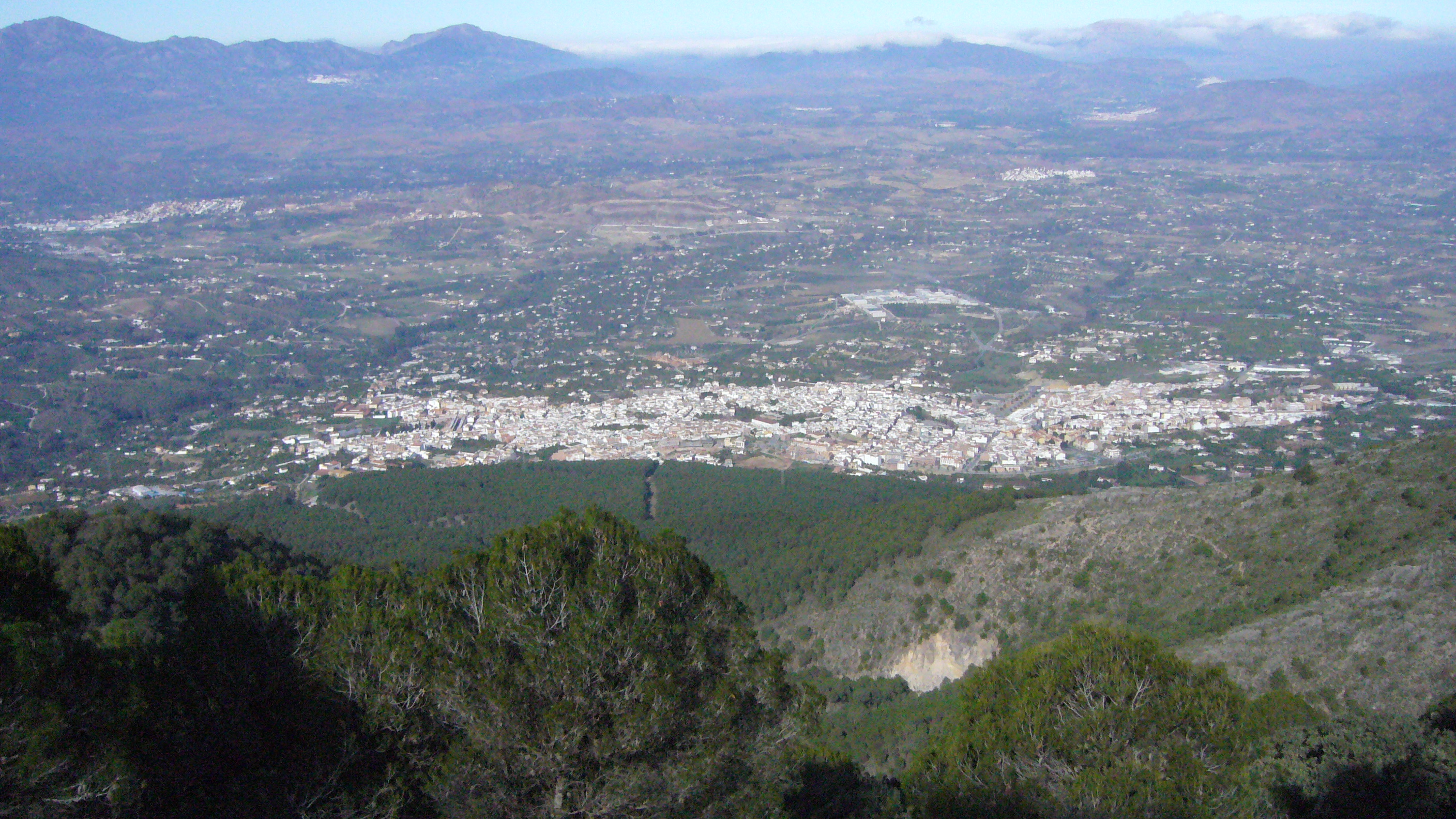 Vista de Alhaurín el Grande, Málaga, España.